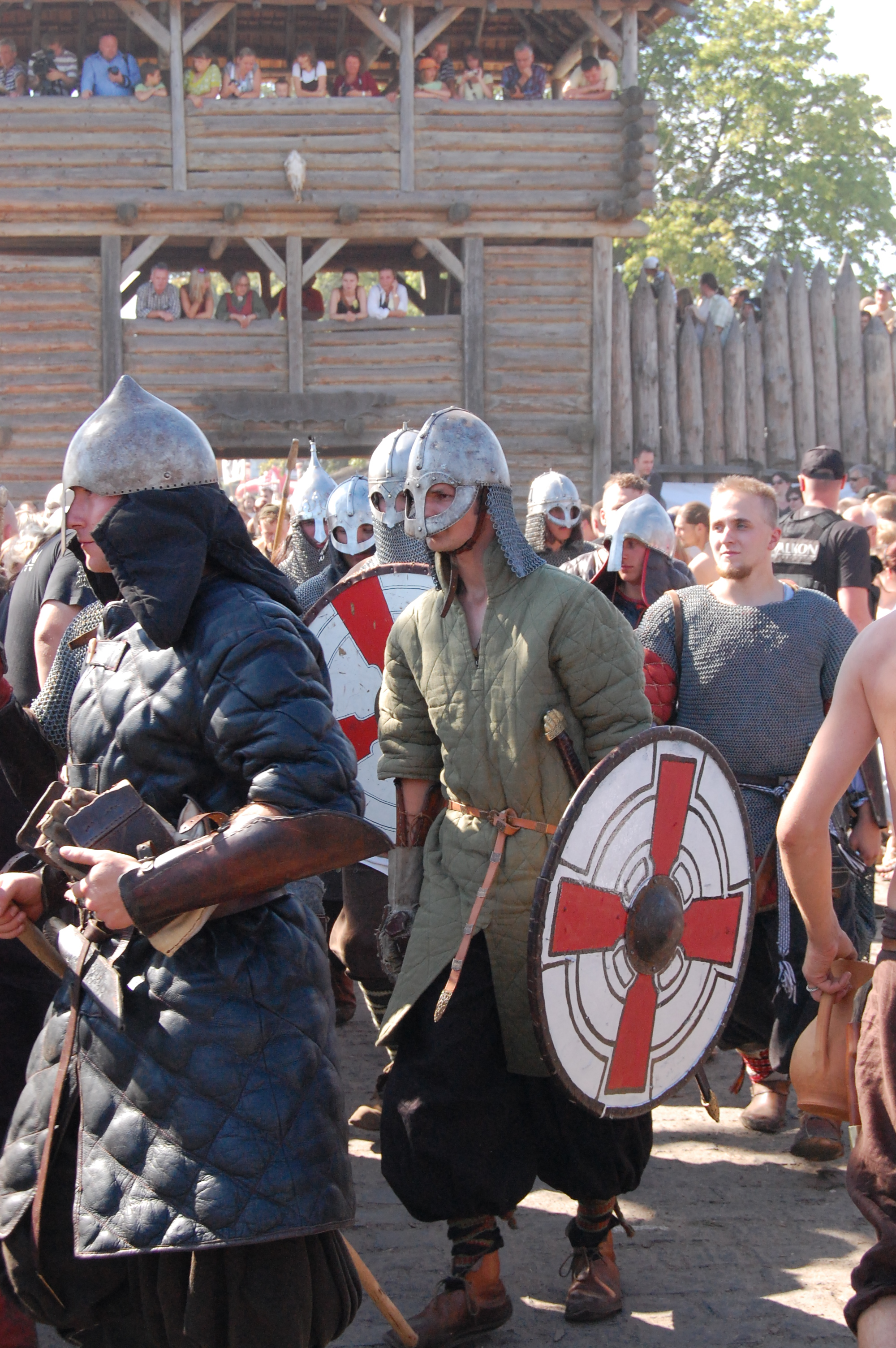 XV Festiwal Słowian i Wikingów w Wolinie w 2009 roku